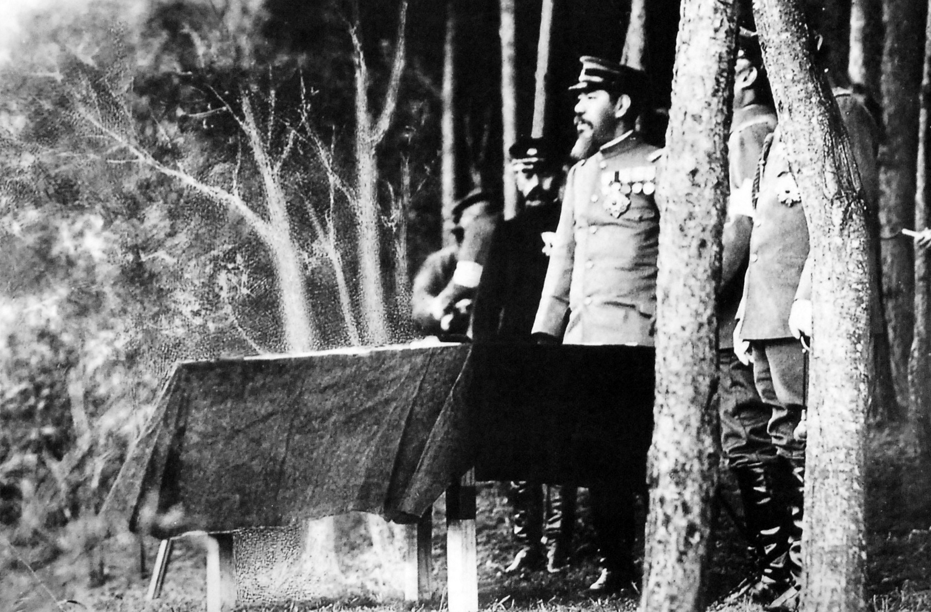 栃木県那須で特別大演習を統監した際の明治天皇。